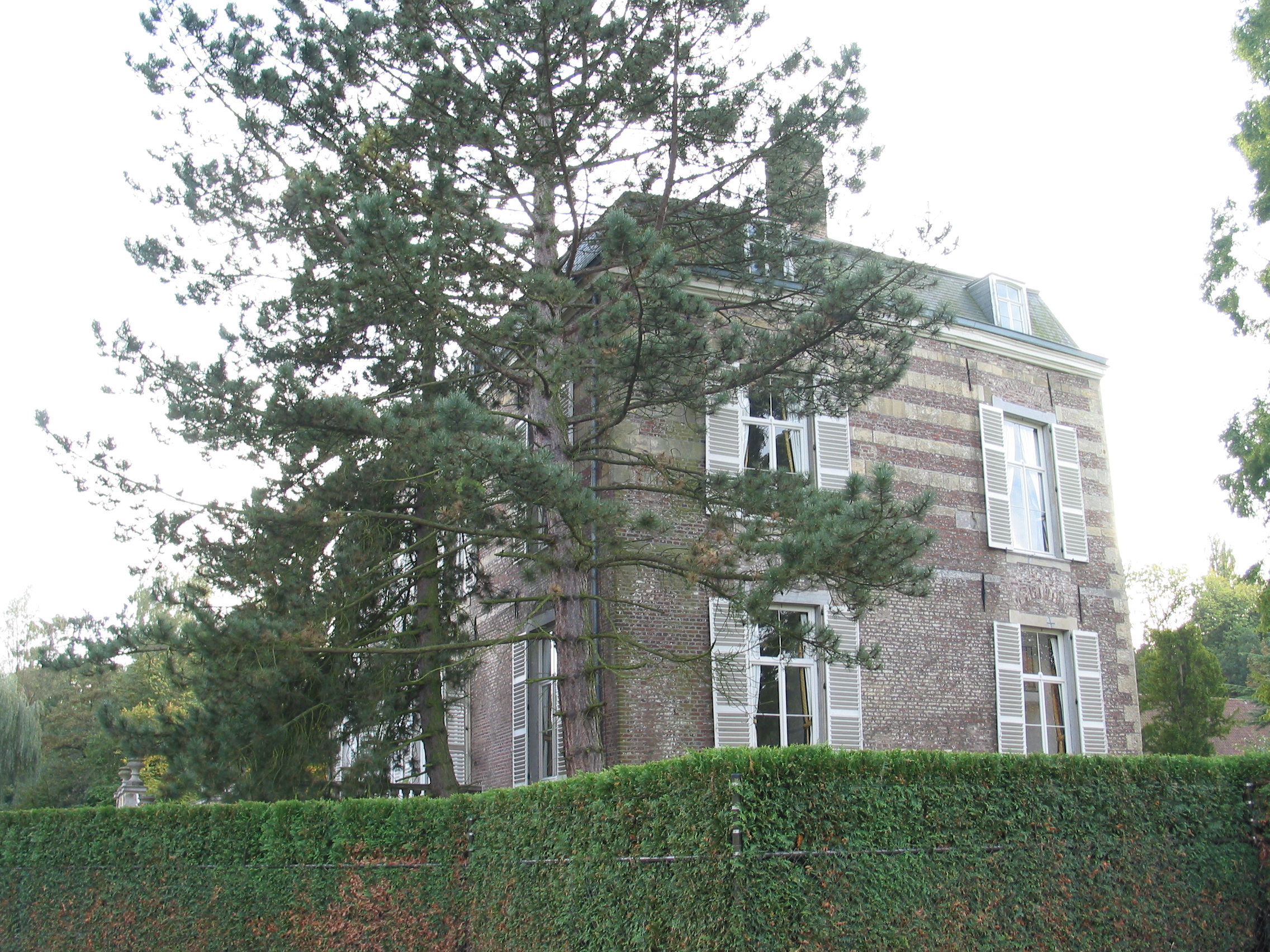 Kasteel Strijthagen, gemeente Landgraaf, Nederland